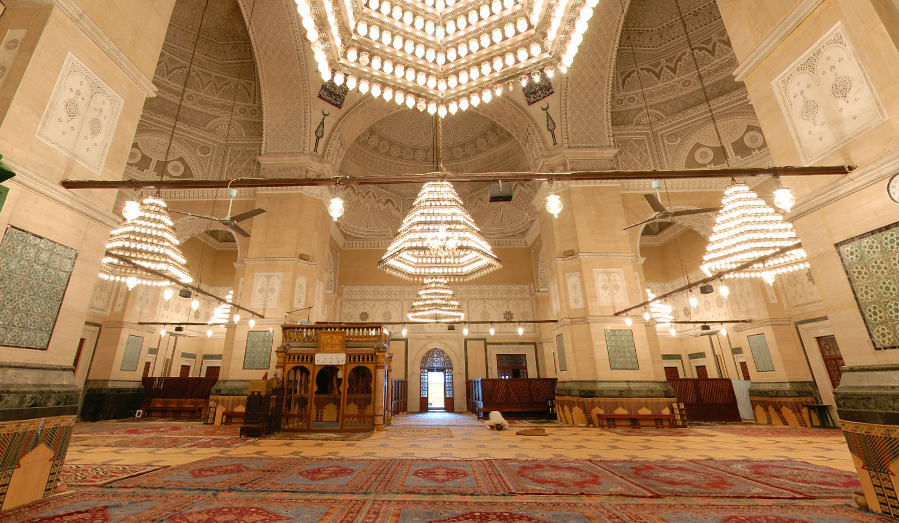 Salle de prière avec les quatres colonnes centrales de la mosquée M'hamed Bey Mouradi à Tunis, Tunisie, aussi appelée Mosquée Sidi Mehrez, construite en 1697